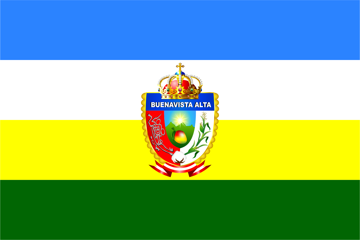 Distrito de Buenavista Alta - Provincia de Casma - Región Ancash